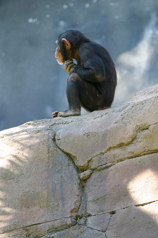 Chimpanzee.